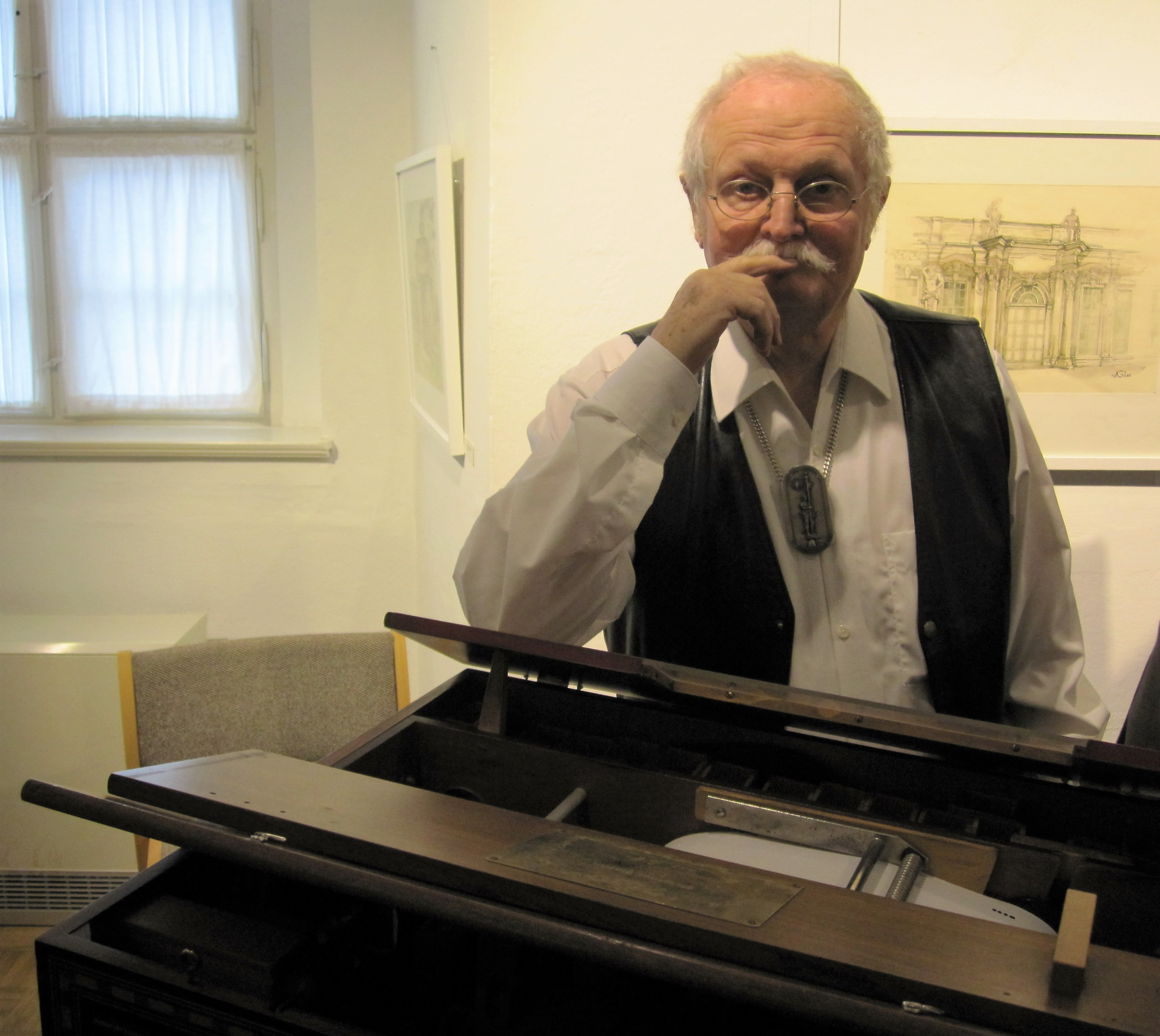 Karlheinz Klimt mit Drehorgel, 2011, Museum Schloss Bernburg, Bilderausstellung zum 100. Geburtstag von Karl Görner